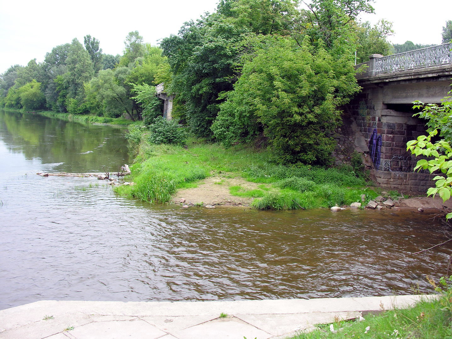 Vilnelės (deš.) ir Neries santaka Vilniuje Foto: Algirdas, 2006 m. rugpjūčio 8 d., Lietuva